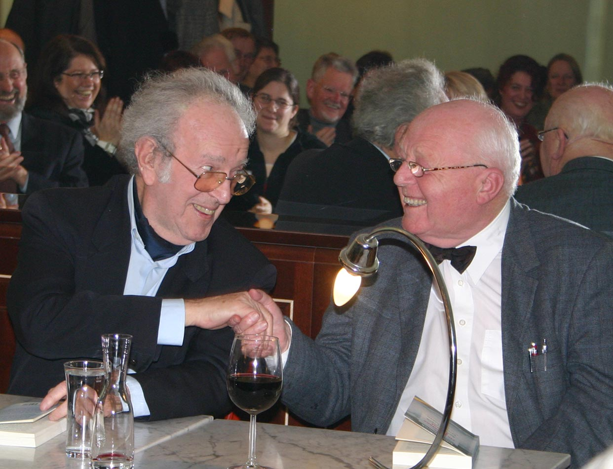 Gerhard Bronner und Alfred Heinrich (2004)